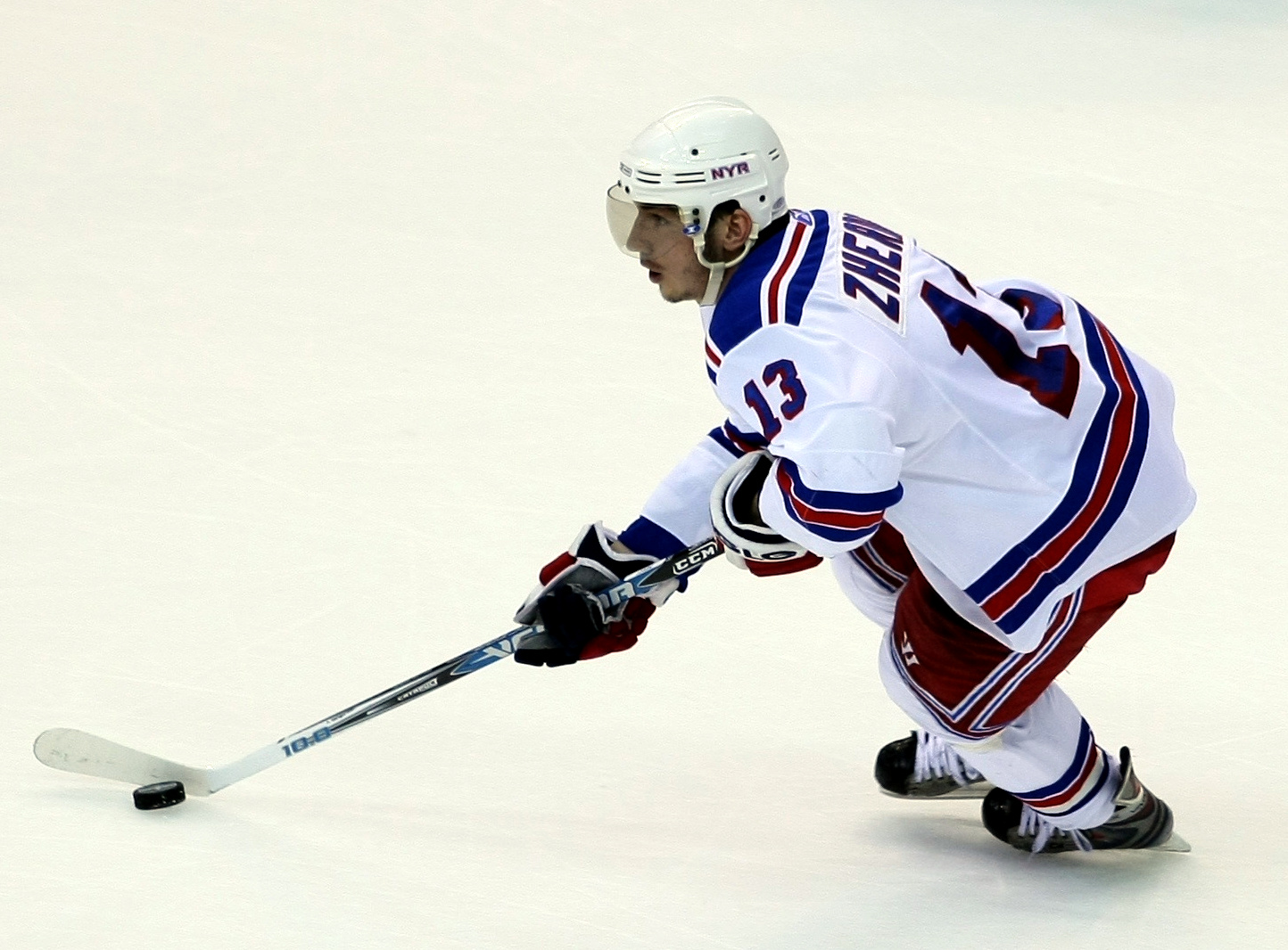 Nikolai Zherdev, 2009